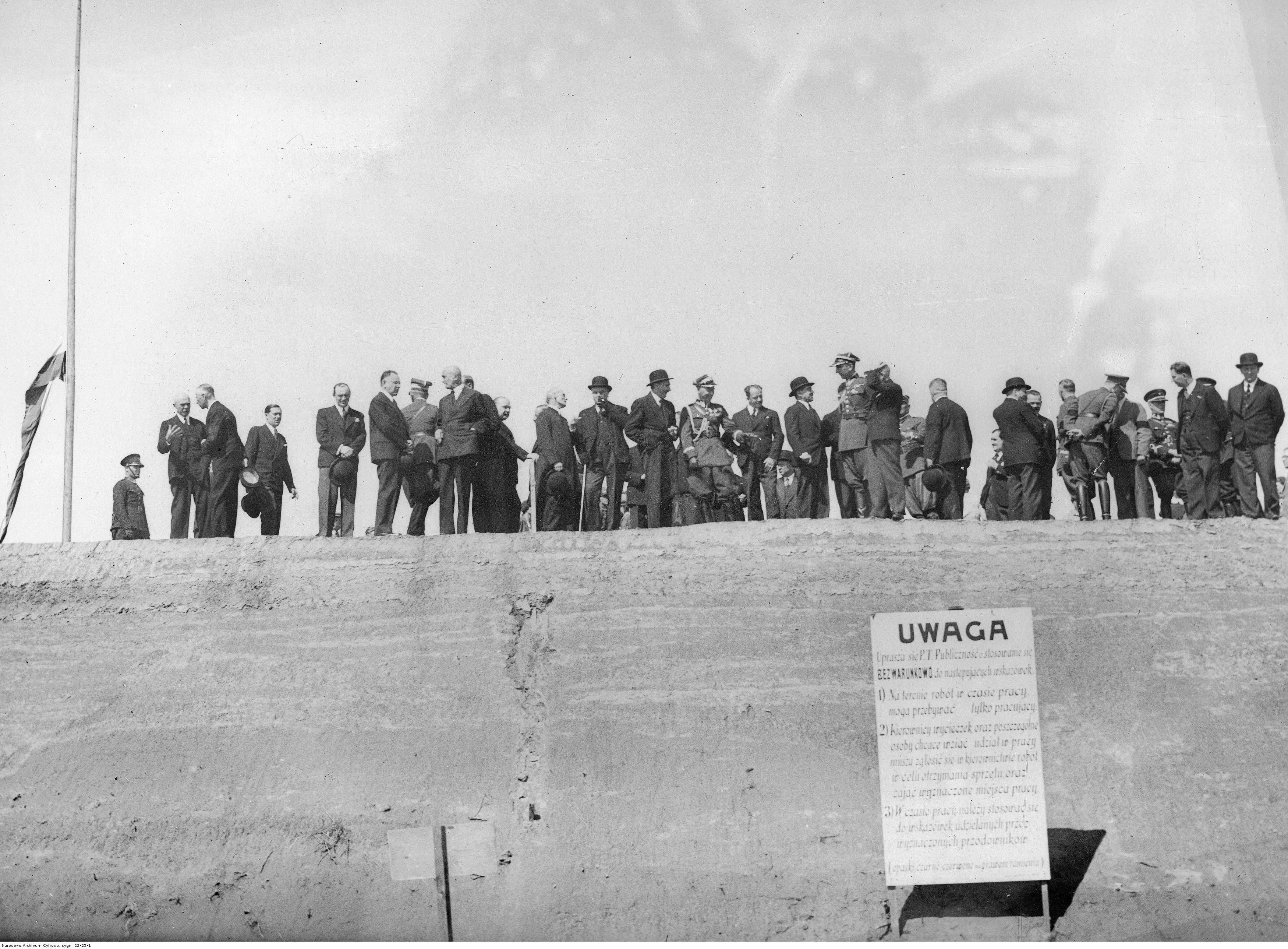 Fotografia grupowa osobistości biorących udział w budowie kopca. Widoczni m.in.: wojewoda krakowski Mikołaj Kwaśniewski (1. z lewej, łysy), Władysław Raczkiewicz (2. z lewej, stoi bokiem), prezydent Krakowa Mieczysław Kaplicki (5. z lewej, stoi bokiem), premier Walery Sławek (na prawo od M. Kaplickiego), minister poczt i telegrafów Emil Kaliński (na prawo od W. Sławka), wiceminister wyznań religijnych i oświecenia publicznego, ks. Bronisław Żongołłowicz (bokiem, w sutannie, trzyma kapelusz), gen. Edward Rydz-Śmigły (w środku, w mundurze), minister spraw wewnętrznych Marian Zyndram Kościałkowski (na prawo od E. Rydza-Śmigłego), szefa sztabu Okręgu Korpusu Nr V w Krakowie, płk Tadeusz Roman Tomaszewski (najwyższy, w mundurze), wicewojewoda krakowski Piotr Małaszyński (2. z prawej).